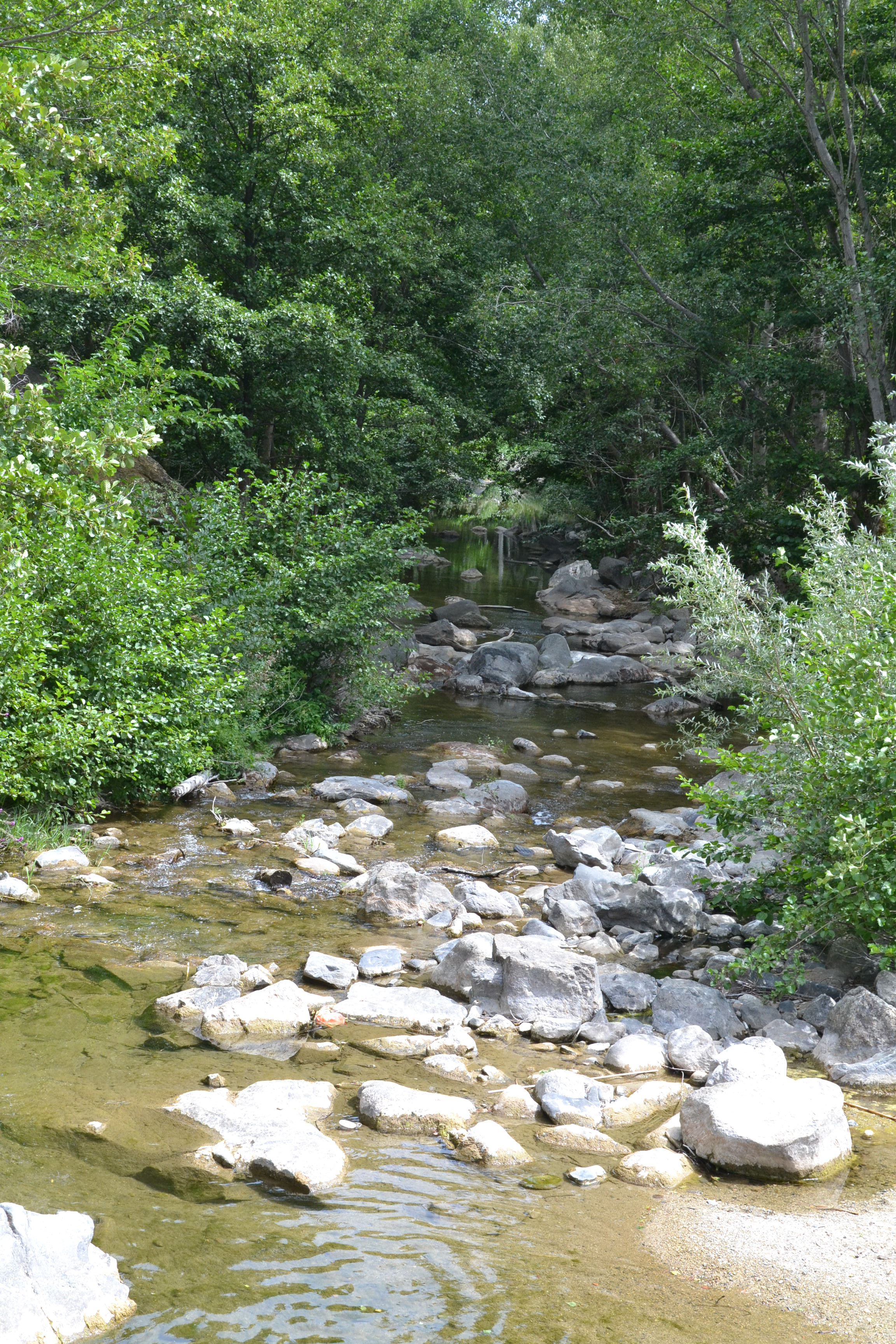 La Desix à Ansignan (Pyrénées-Orientales, France)